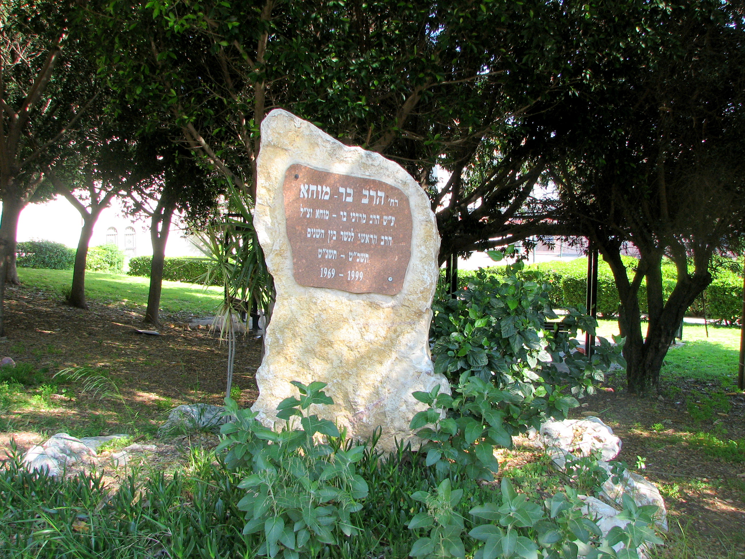 The City Nesher on Mount Carmel and Suburb: Tel Hanan תל חנן שכונה בעיר נשר. בתי השכונה נבנו על הכפר הערבי בלד א-שייח' שניטש באפריל 1948 יחד עם נטישת תושבי חיפה הערביים את חיפה. תל חנן יושבה על ידי עולים חדשים אשר התיישבו בבתים הנטושים. עם השנים נהרסו בתים אלה ונבנו שיכונים. אבן אנדרטה לכבודו של הרב מרדכי בר-מוחא אשר היה רבה הספרדי של העיר נשר בשנים 1969-1999 שימש לפני כן כמורה ומחנך בבית הספר הממלכתי דתי ישורון. האנדרטה בכניסה לרחוב על שמו שהוסב מרחוב הפועל